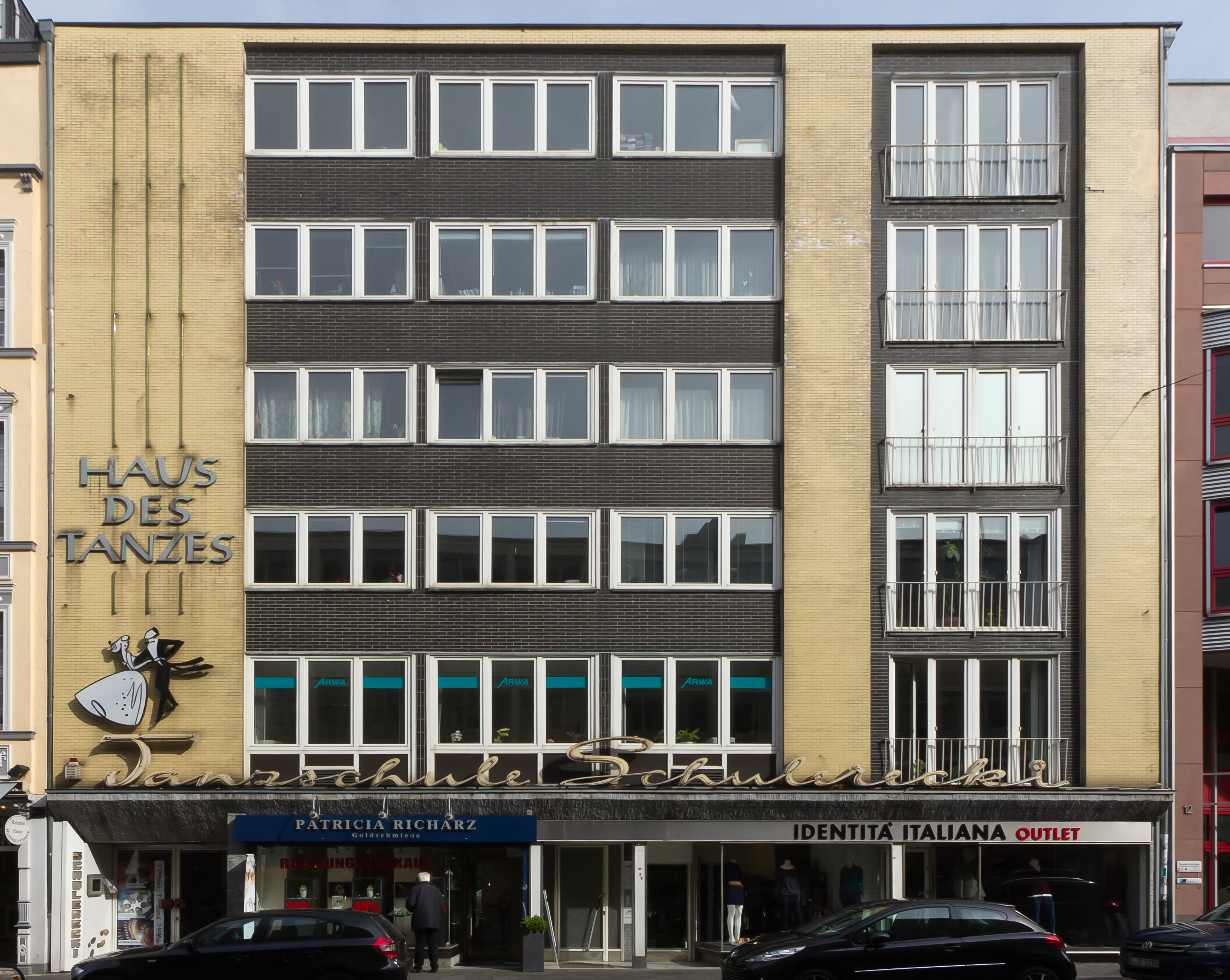 Haus des Tanzes - Apostelnstr 14-18, Köln